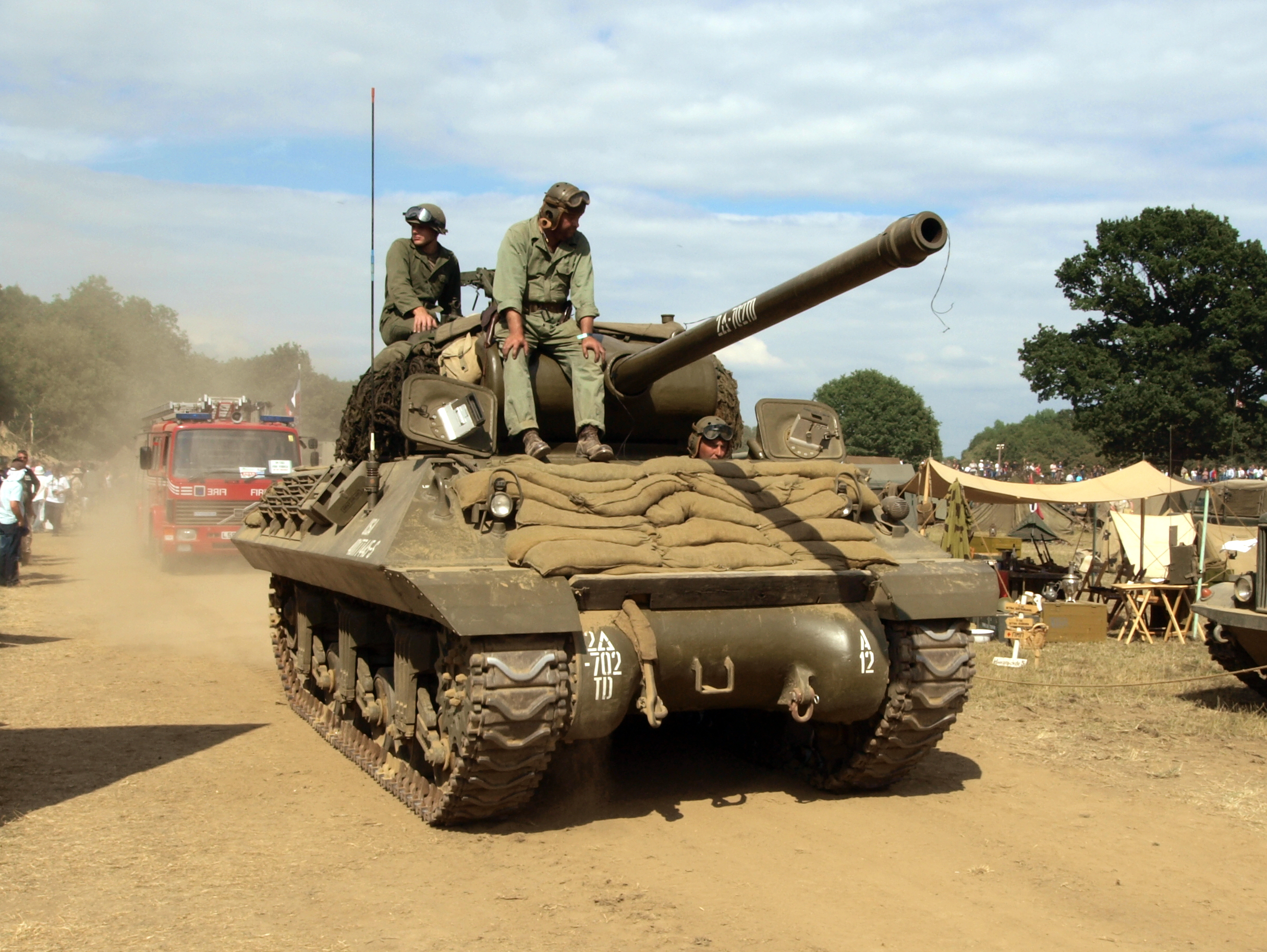 M36 tank destroyer